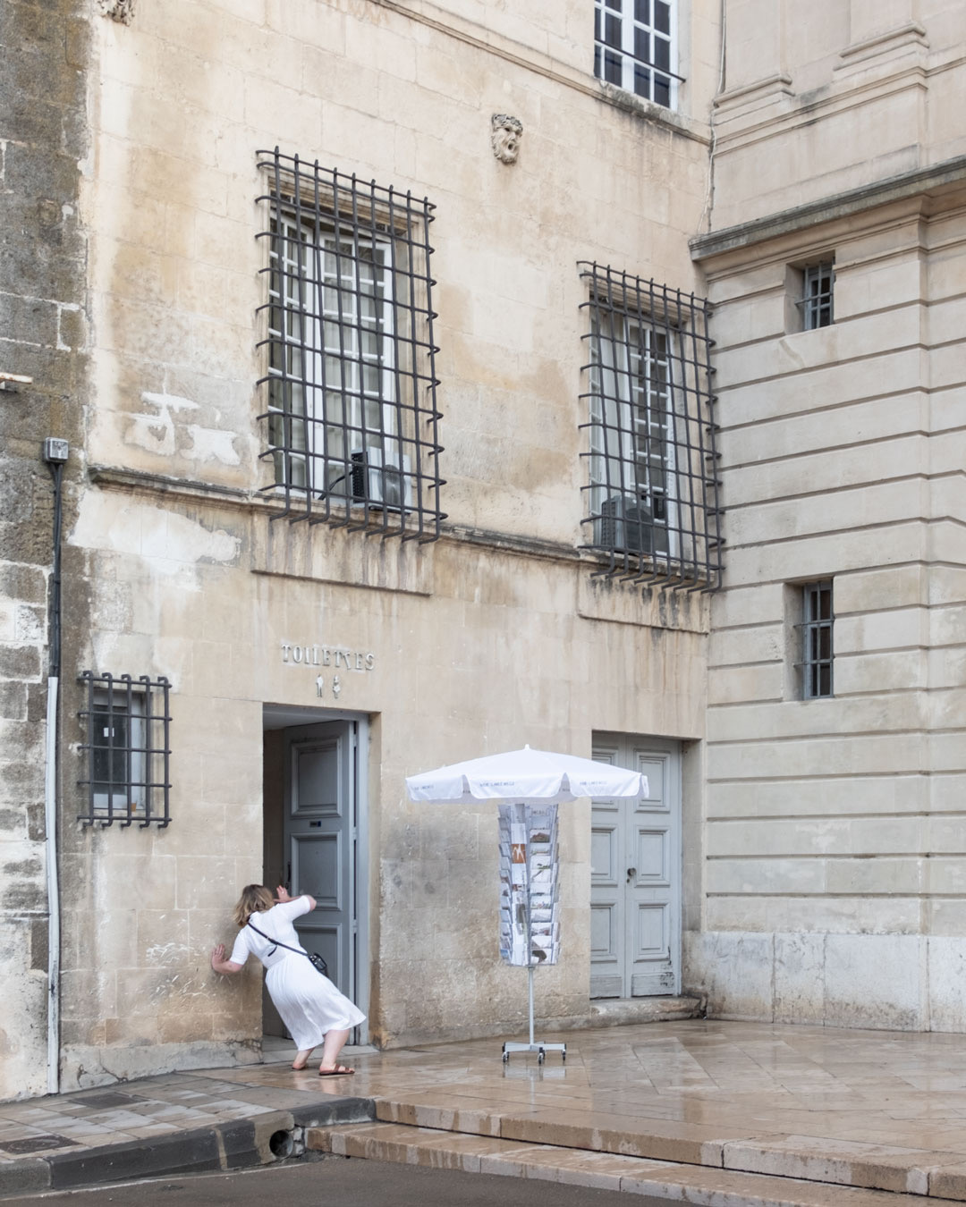 "Der Postkartenständer" - die mobile Galerie der Neuen Langeweile zeigt die Ausstellung NL 1.1 in Arles